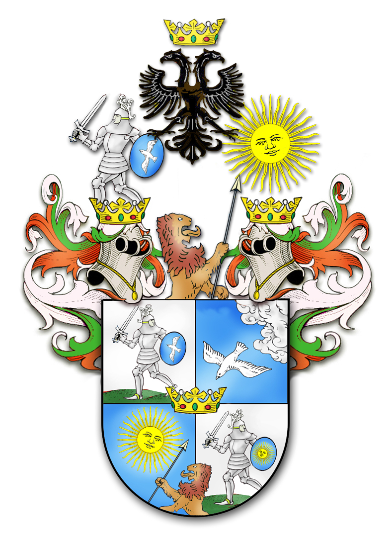 Brasão Manfroni de Caldes. Recriação de um afresco do século XVIII na Casa Manfroni-Gentilini, reproduzido em Mosca, Alberto. Caldes: storia di uma nobil comunità. Regione Autonoma Trentino Alto Adige / Provincia Autonoma di Trento / Consorzio dei Comuni della Provincia di Trento B.I.M. Alto Adige / Cassa Rurale Rabbi e Caldes, s/d. As cores dos lambrequins não incertas.